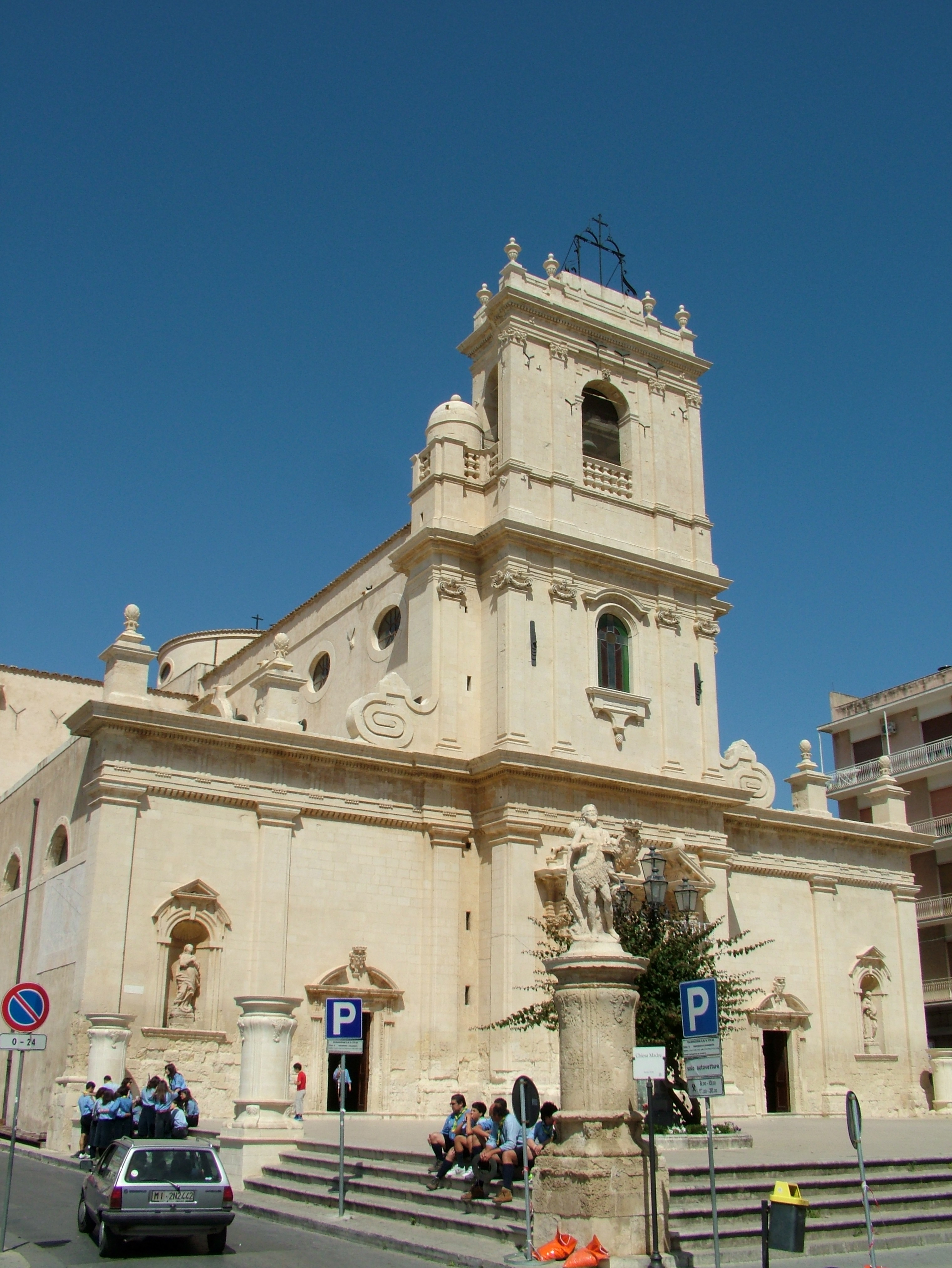 Avola, Sizilien, Chiesa Madre di S. Nicolò di Mira